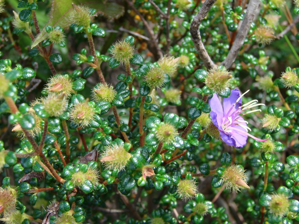 Pterolepis cataphracta (Cham.) Triana - MELASTOMATACEAE - Parque Nacional da Chapada Diamantina - Palmeiras - Bahia - Brasil.